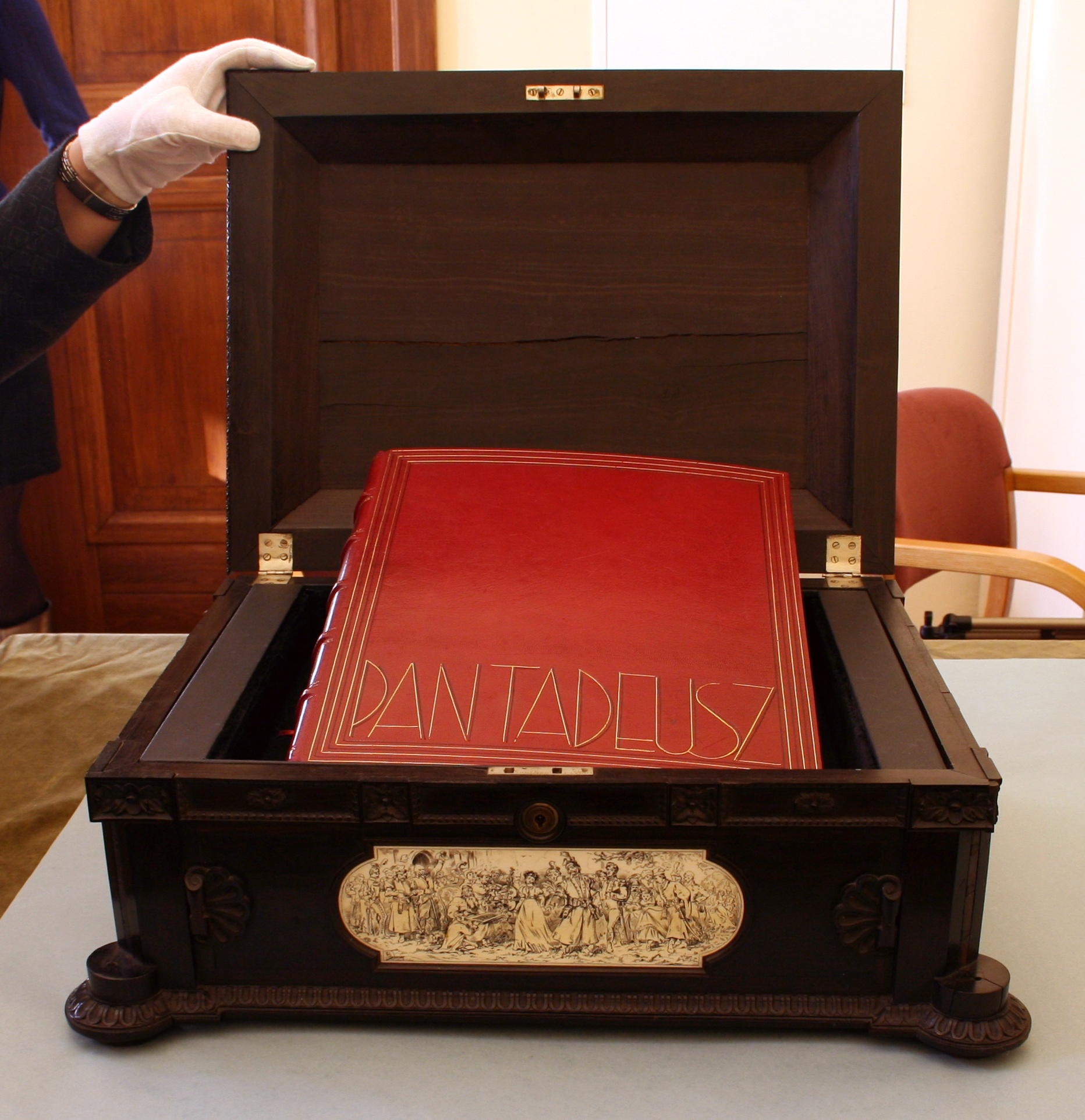 Rękopis Pana Tadeusza w zbiorach Zakładu Narodowego im. Ossolińskich we Wrocławiu.